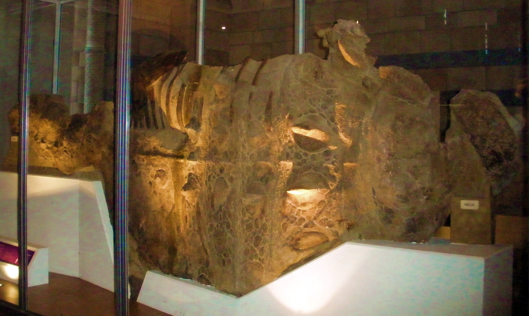 Fossil of Scolosaurus cutleri (holotype specimen NHMUK R5161), an extinct dinosaur-- Took the photo at Natural History Museum, London